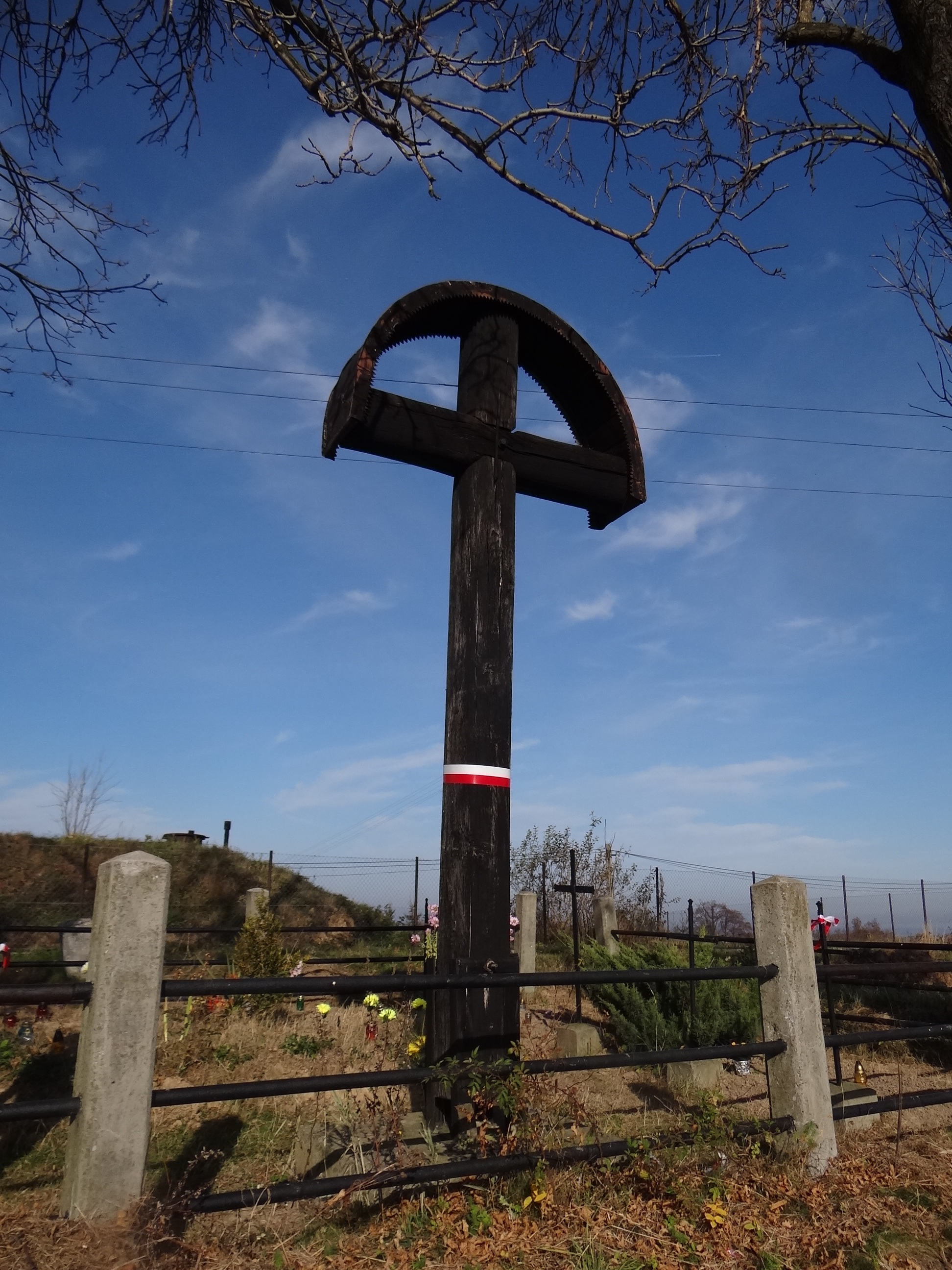 Cmentarz wojenny nr 336 - Gierczyce-Czyżyczka